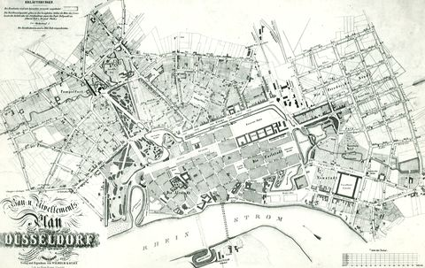 stadtplan_duesseldorf_1854